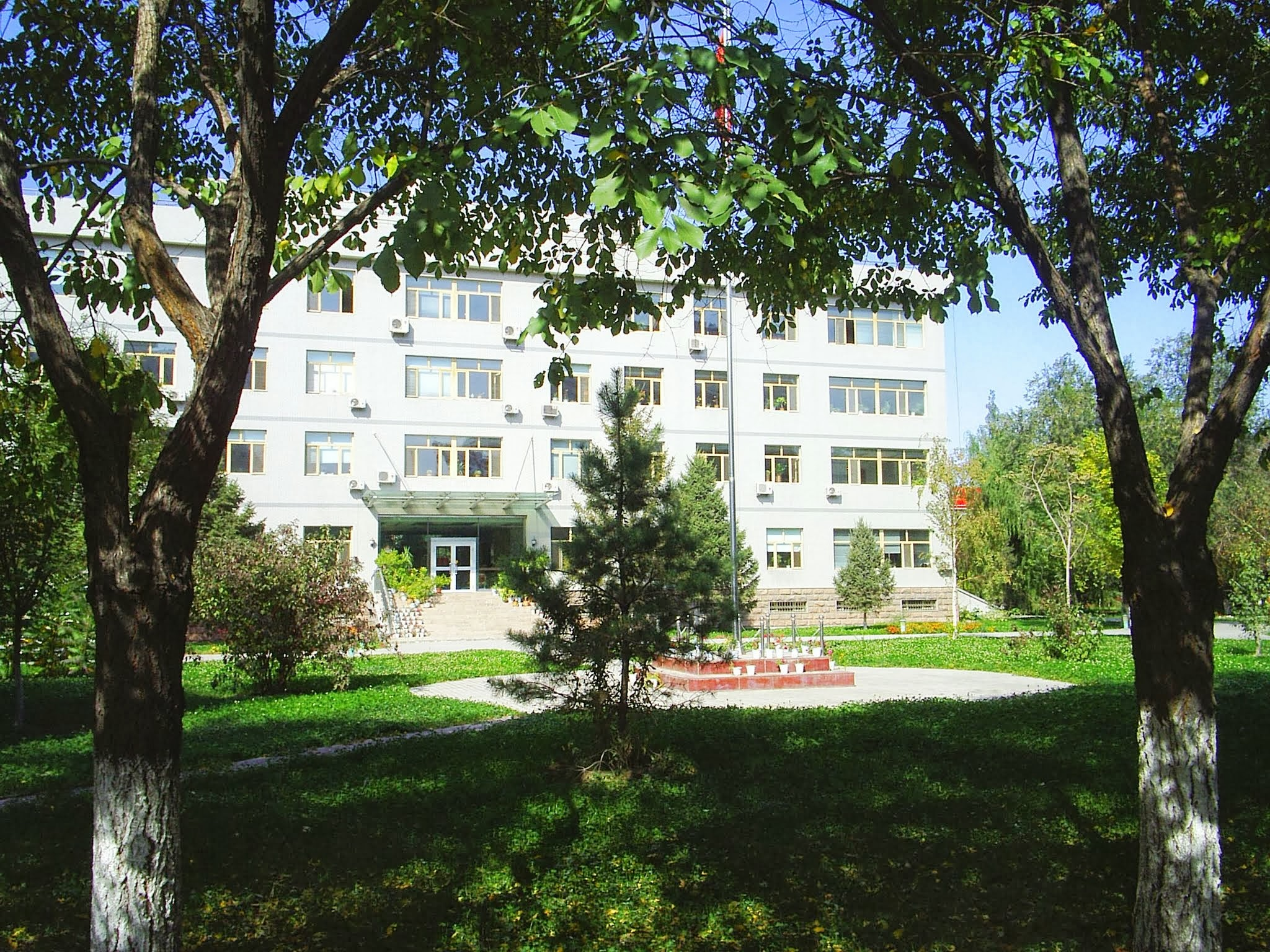 新疆天文台办公楼